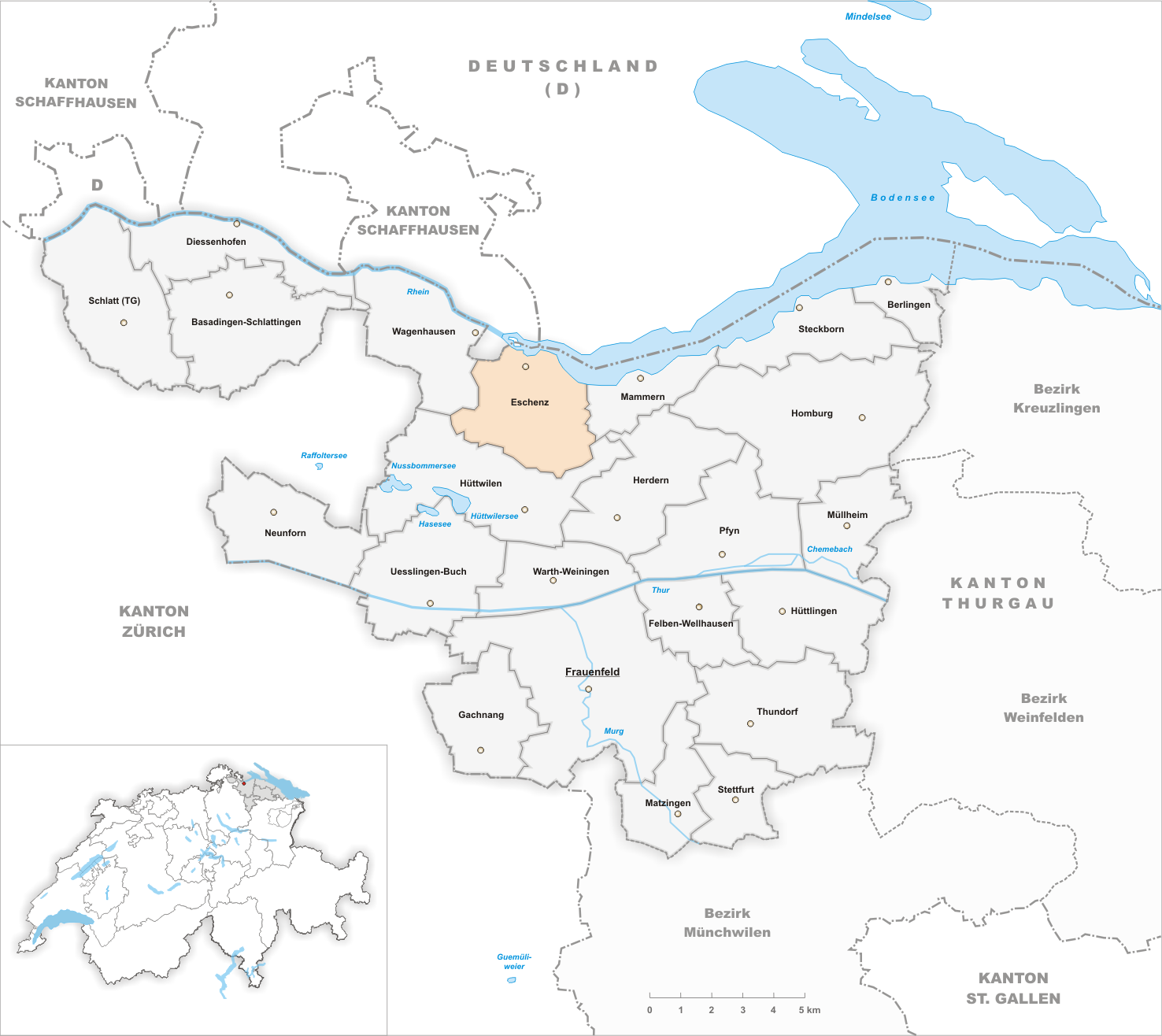 Municipality Eschenz